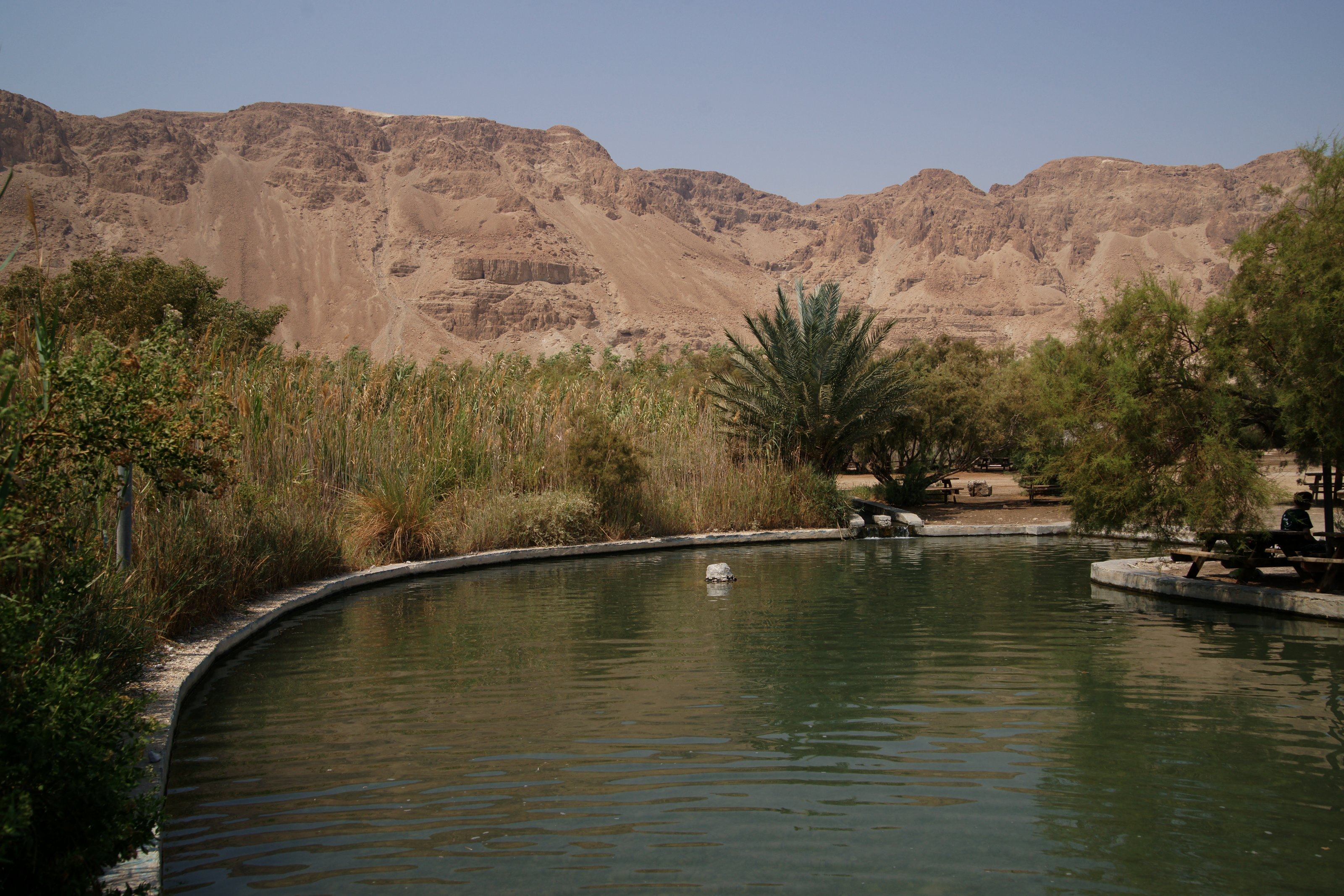 Einot Tzukim: Badeteich